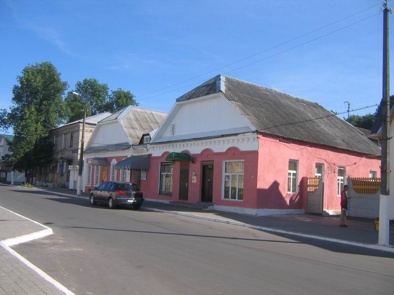 Беларуская (тарашкевіца): Ігумен